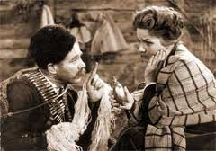 Petre Prlichko